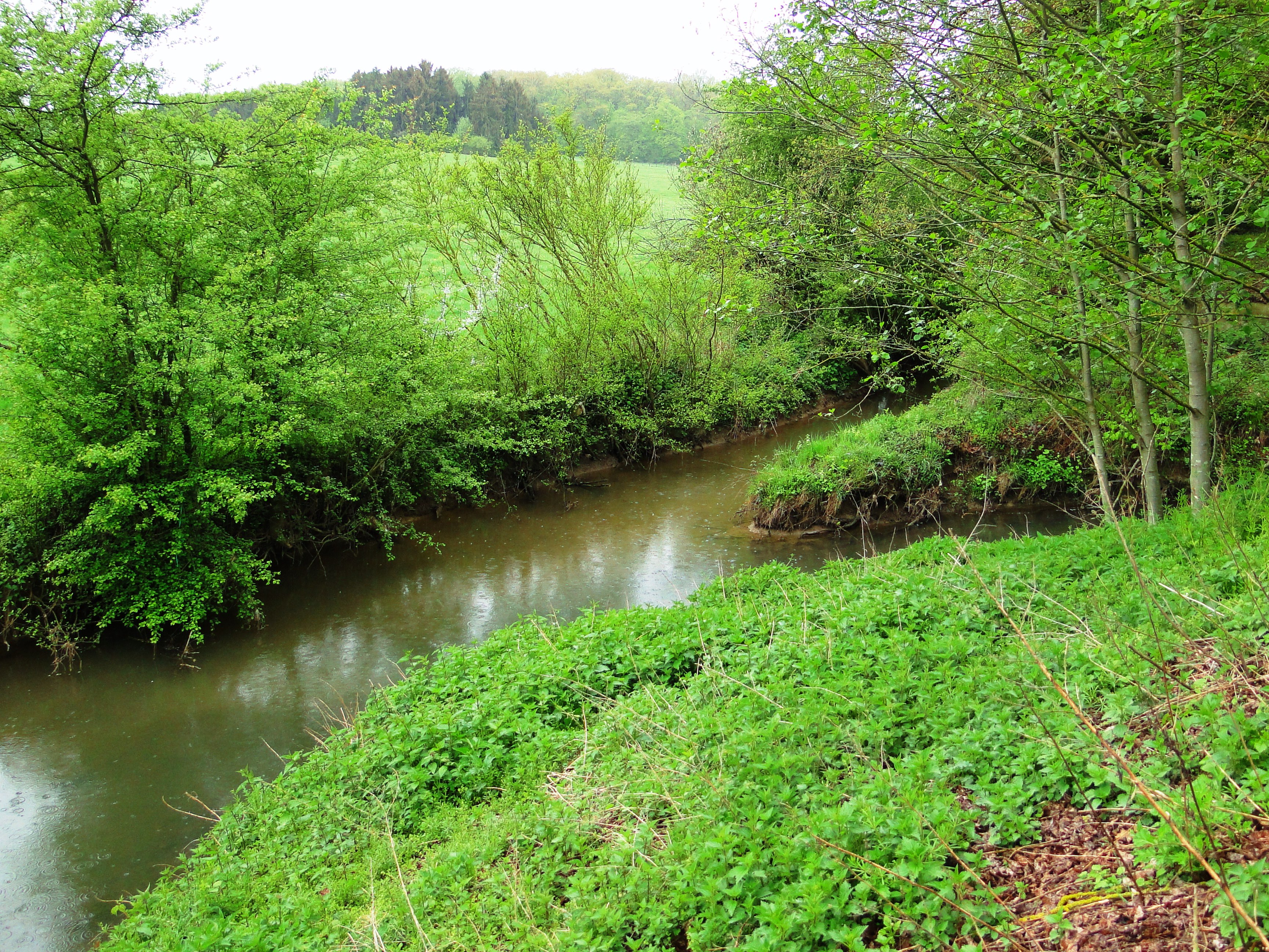 D'Grouf (lénks) leeft op der Helfenterbréck an d'Péitruss